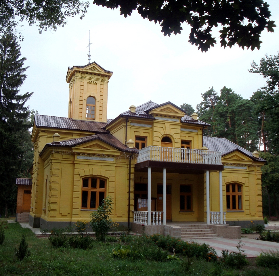 Дім графині Уварової у Ворзелі